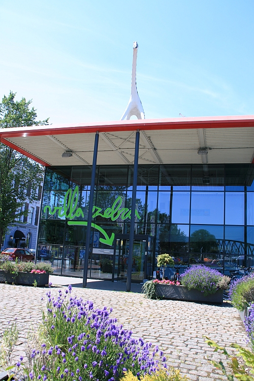 Villa Zebra is een kindermuseum in Rotterdam en maakt tentoonstellingen en workshops voor kinderen van 4 tot en met 12 jaar.